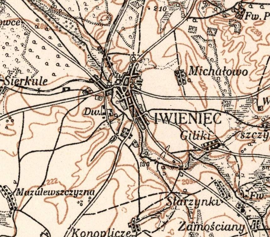 Map of Iwieniec, now Belarus